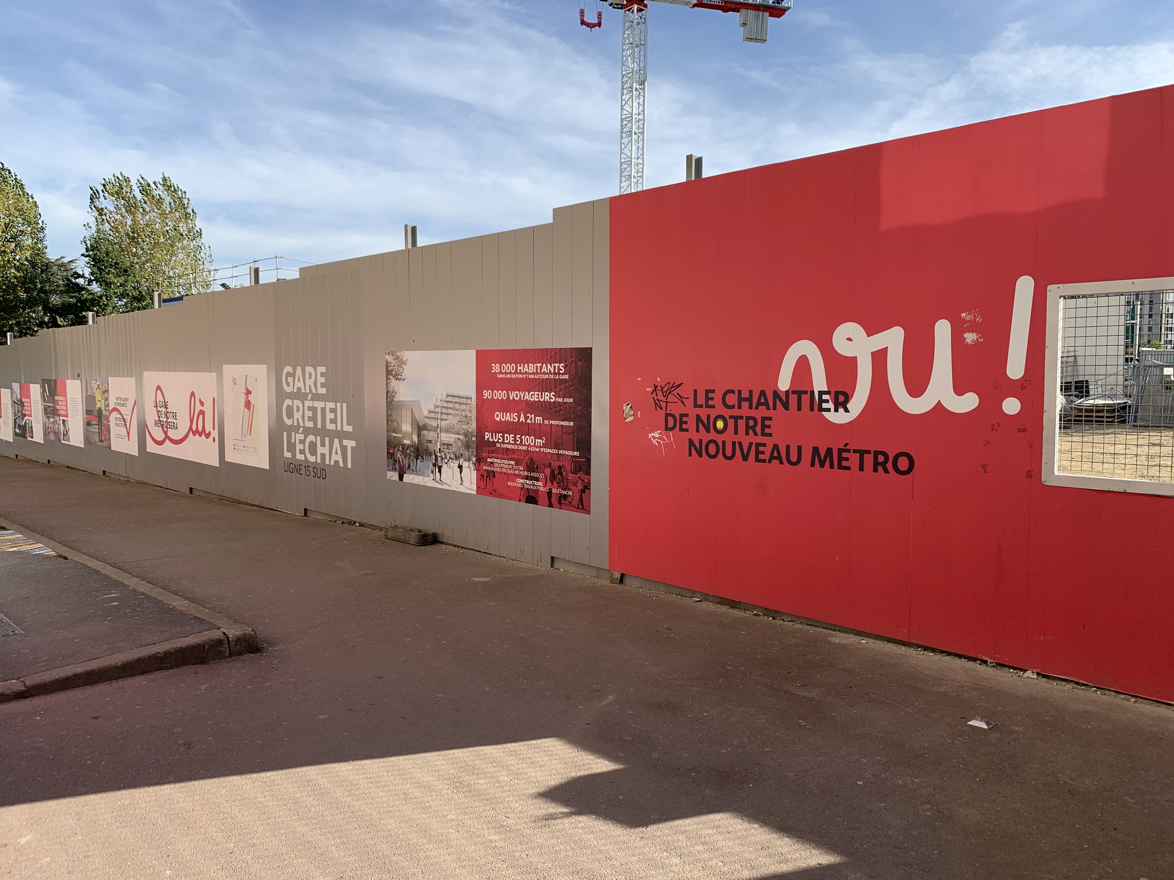 Travaux de la ligne 15 à la station de métro Créteil - l'Échat, Créteil.